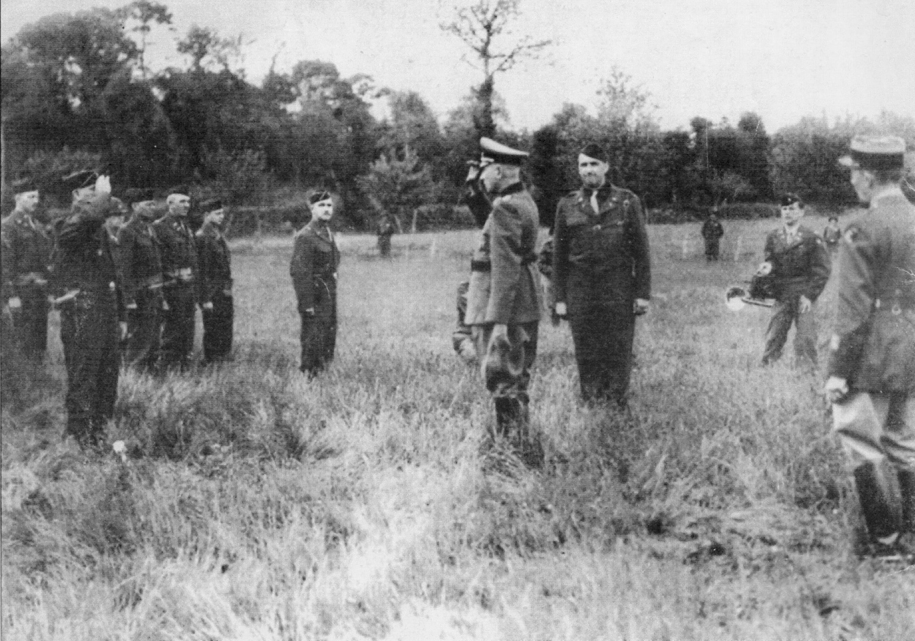 Reddition allemande dans un champ à Caudan (Morbihan). Le général allemand Fahrmbacher remet son pistolet au général Kramer.